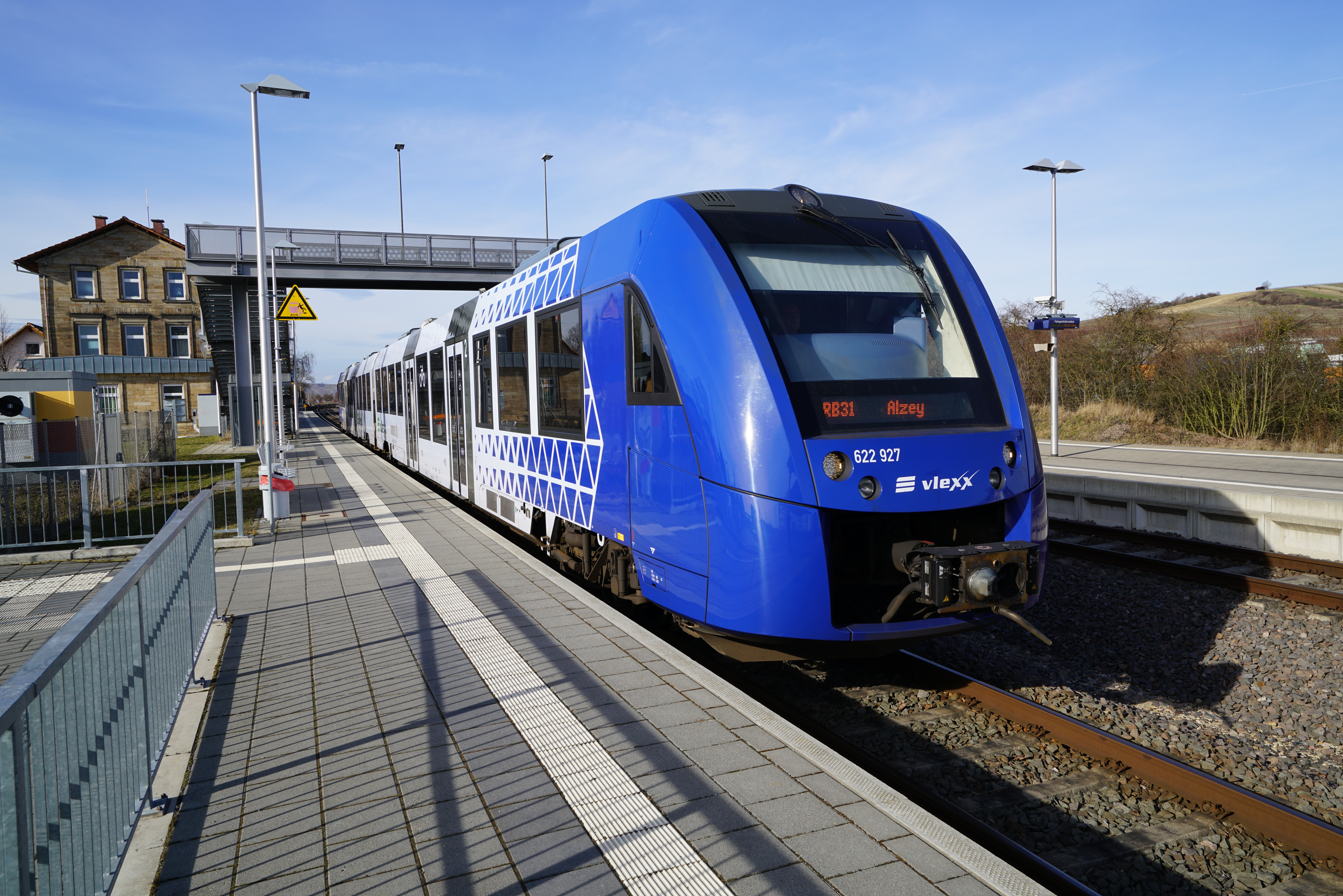 Alstom Coradia LINT 54 (622 927) im Auftrag von Vlexx im Bahnhof Armsheim als RB 31 auf dem Weg vom Mainzer Hauptbahnhof nach Alzey